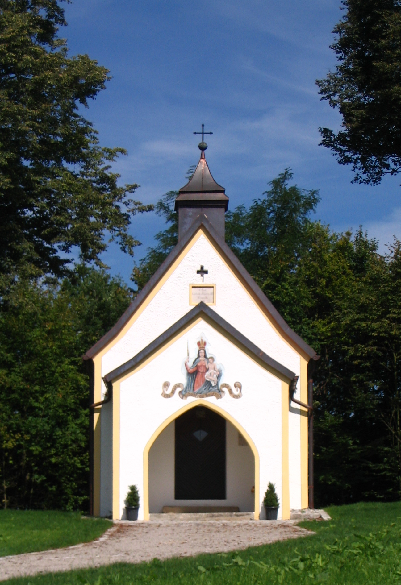 Zur Ehren des Seligen Bauern auf dem Galgenberg bei Menning (Vohburg), Landkreis Pfaffenhofen, Oberbayern errichtete Kapelle